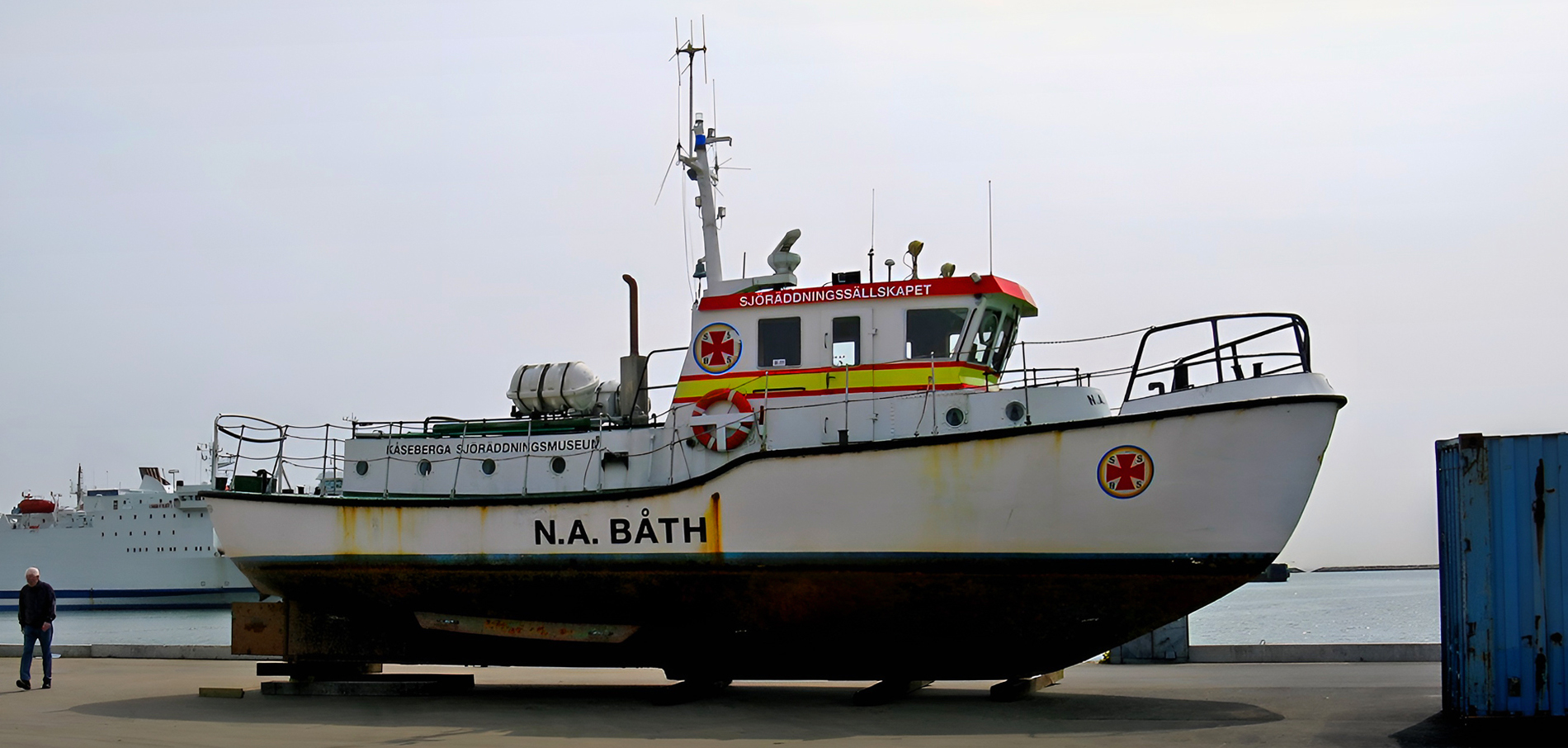 N.A. Båth vilar på kajen i Ystads hamn. 14 maj 2011.